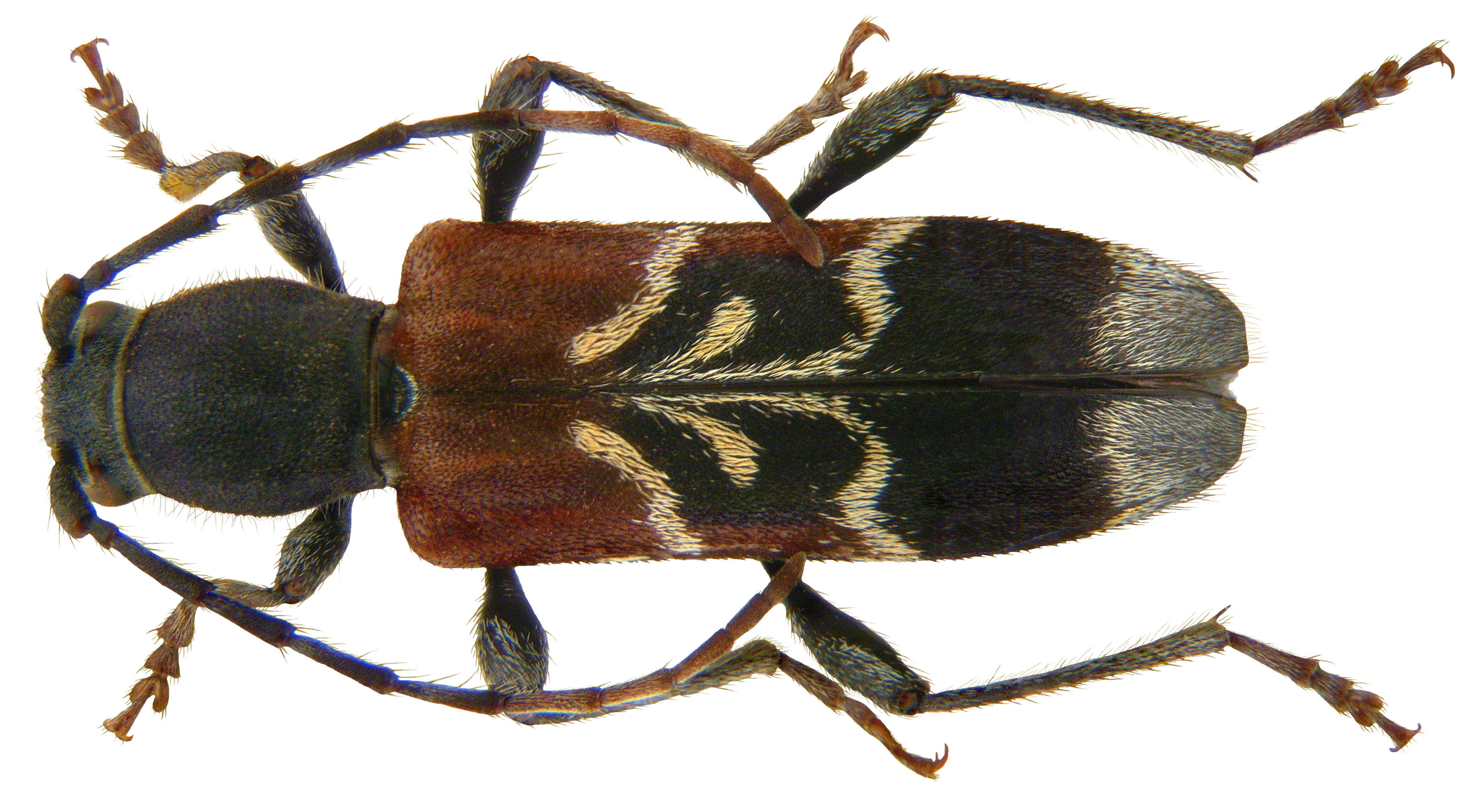 Familie: Cerambycidae Grösse: 6-14 mm Verbreitung: Europa Ökologie: Entwicklung in Laubholz Fundort: Germania, Bayern, Oberfranken, Kulmbach leg.det. U.Schmidt, 1972 Foto: U.Schmidt, 2009